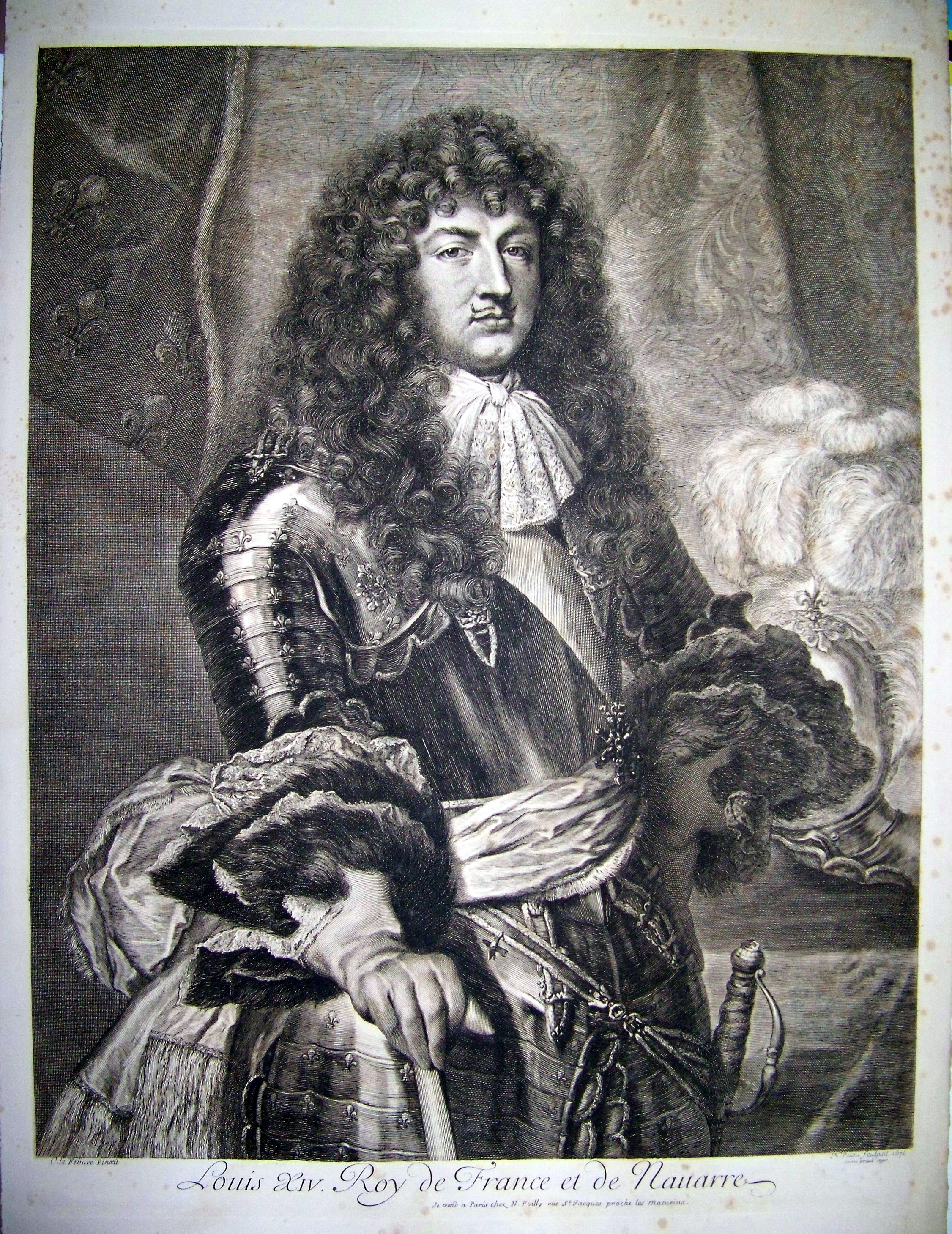 Louis XIV en 1670 - dessin de Claude Lefèvre, gravure de N.Pitau